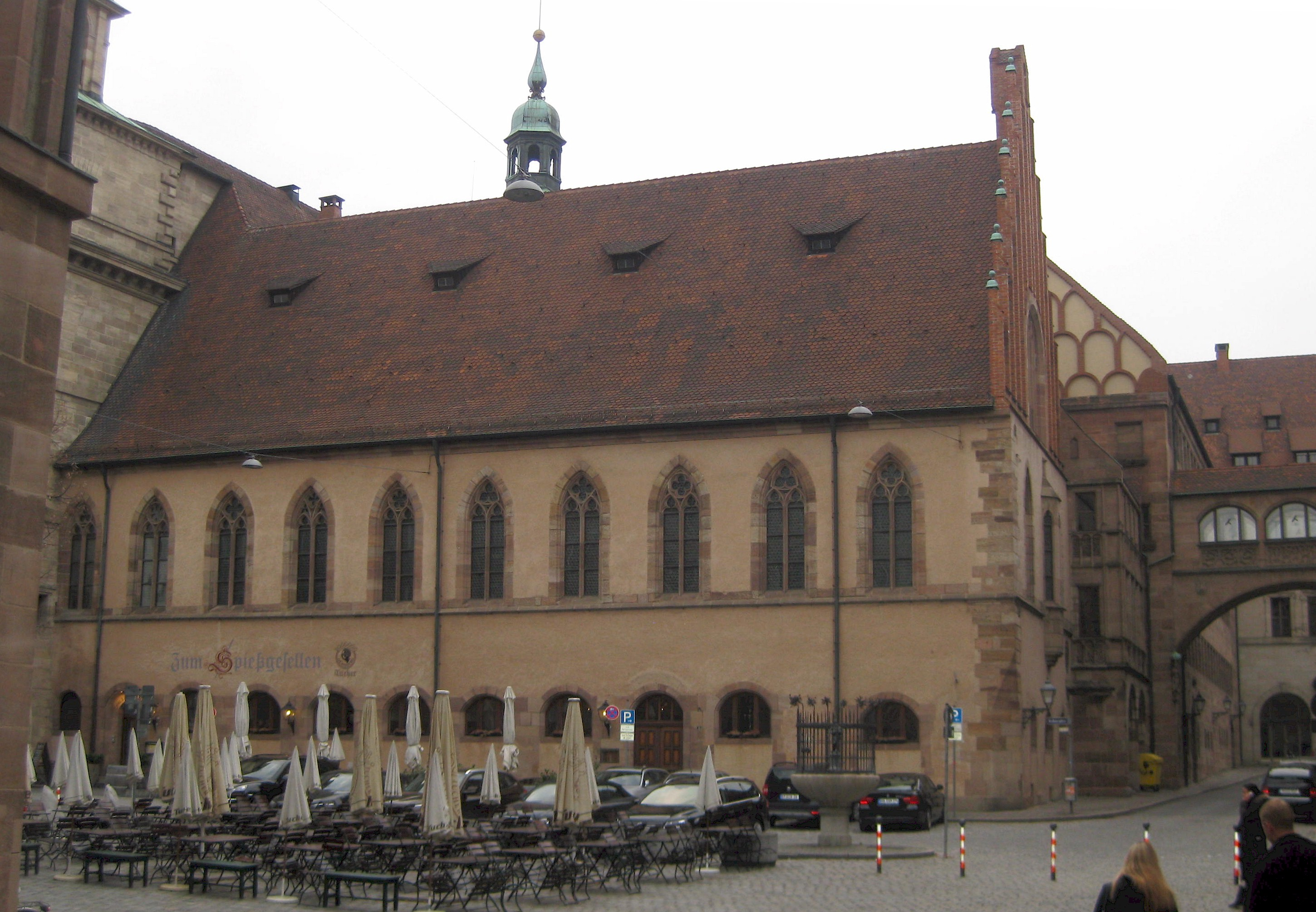 Südfassade des Alten Rauthauses in Nürnberg (Großer Saal)